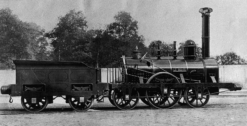 Origine : Vieille photographie